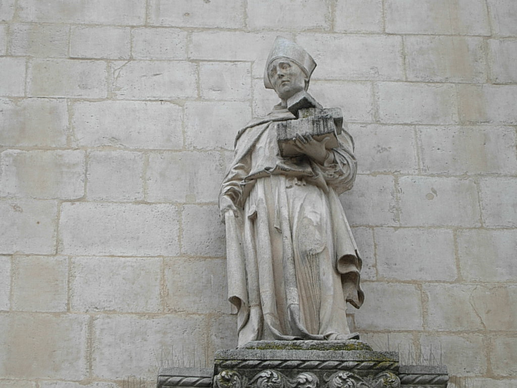 Statua di San Panfilo. Complesso della SS. Annunziata in Sulmona (AQ) Foto personale